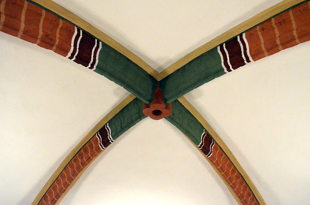 Braunschweig, Liberei: Innenaufnahme des restaurierten Kreuzrippengewölbes.